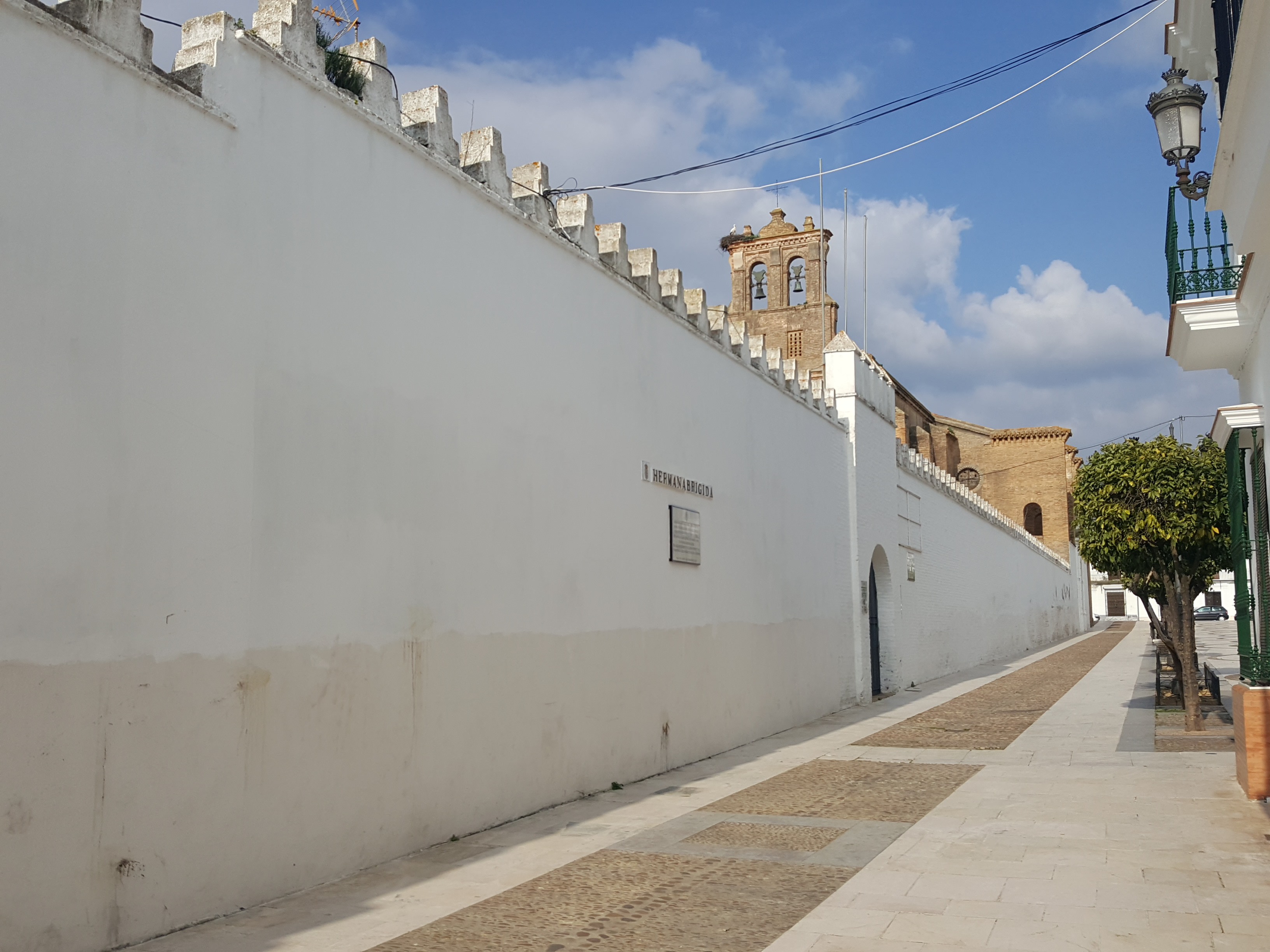 Monasterio de Santa Clara de Moguer. Muralla exterior del monasterio.